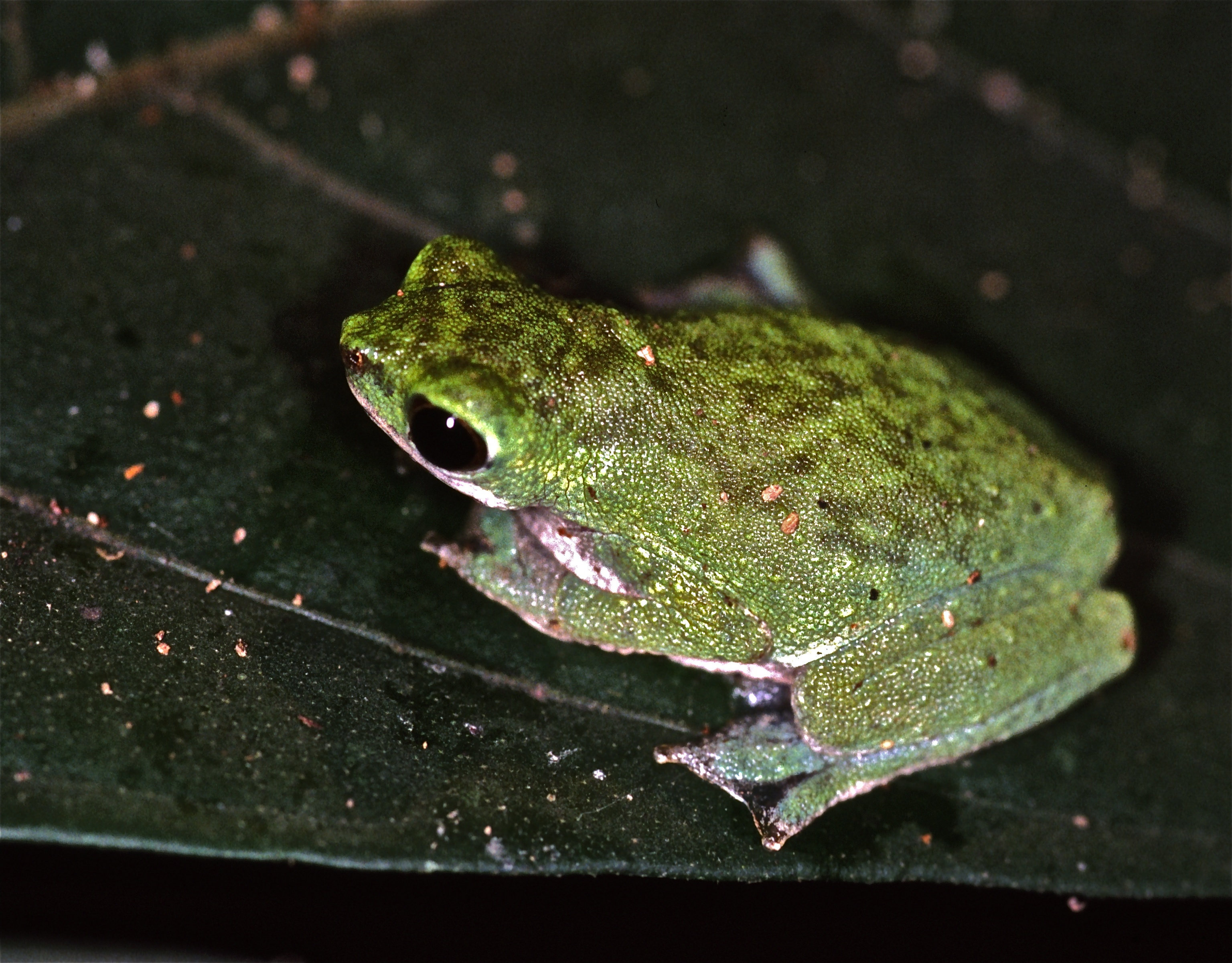 Korup NP, Cameroon